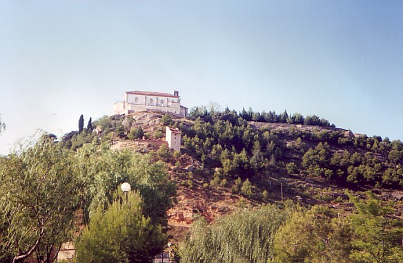 Ermita de San Macario en Andorra (Teruel)